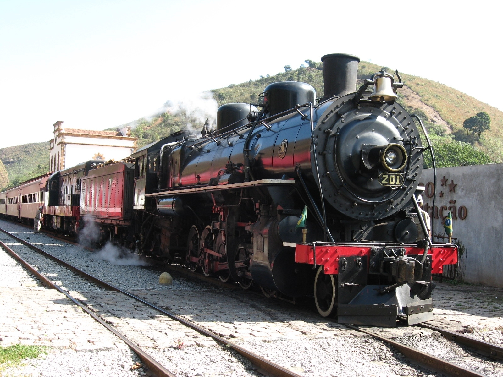 Maria Fumaca que faz trajeto Mariana para Ouro Preto Minas Gerais